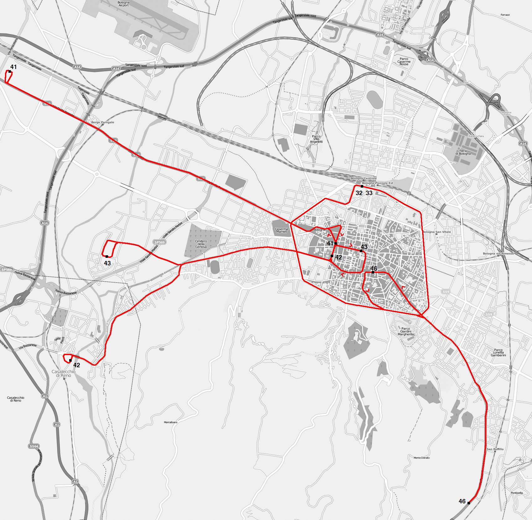 Mappa della rete filoviaria di Bologna nel 1976. This map may be incomplete, and may contain errors. Don't rely solely on it for navigation.